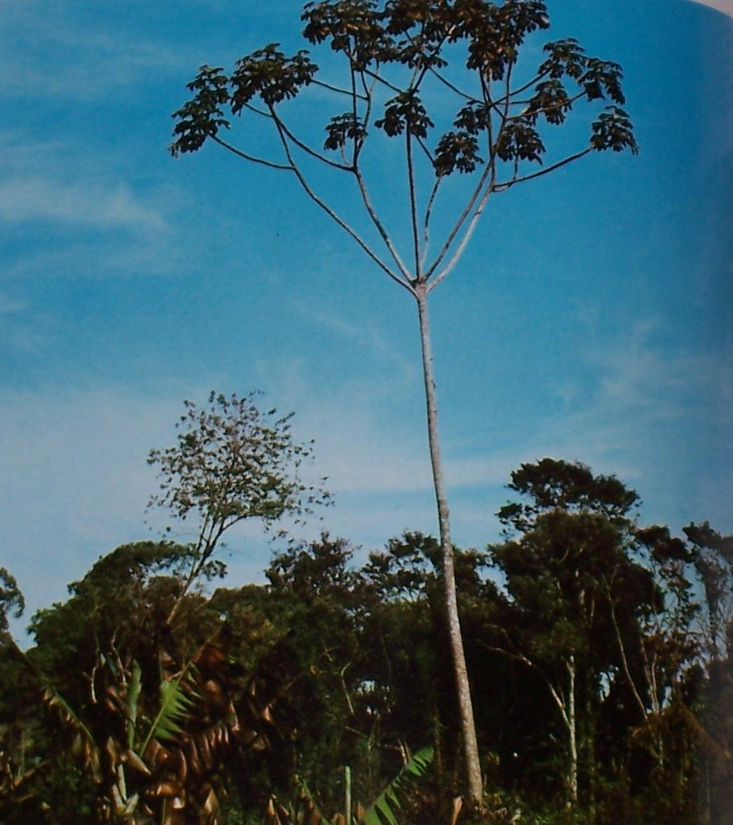 Ambay (Cecropia pachystachya).